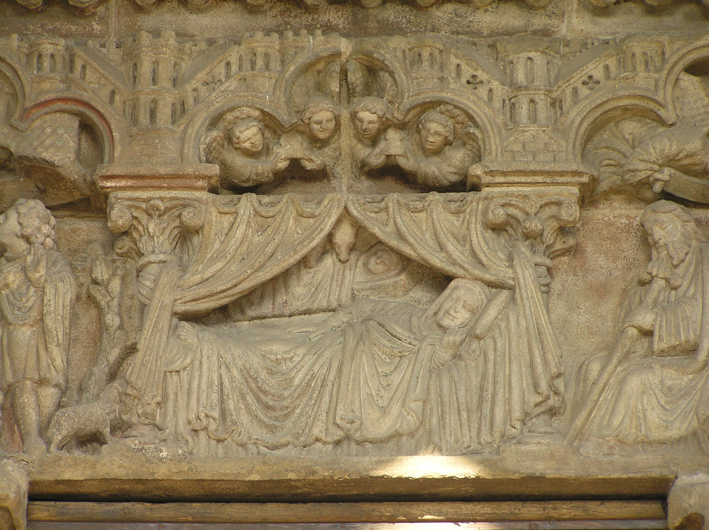 Cathedral of Tui - detail: Death of Mary Zaśnięcie Najświętszej Maryi Panny - detal z katedry w Tui